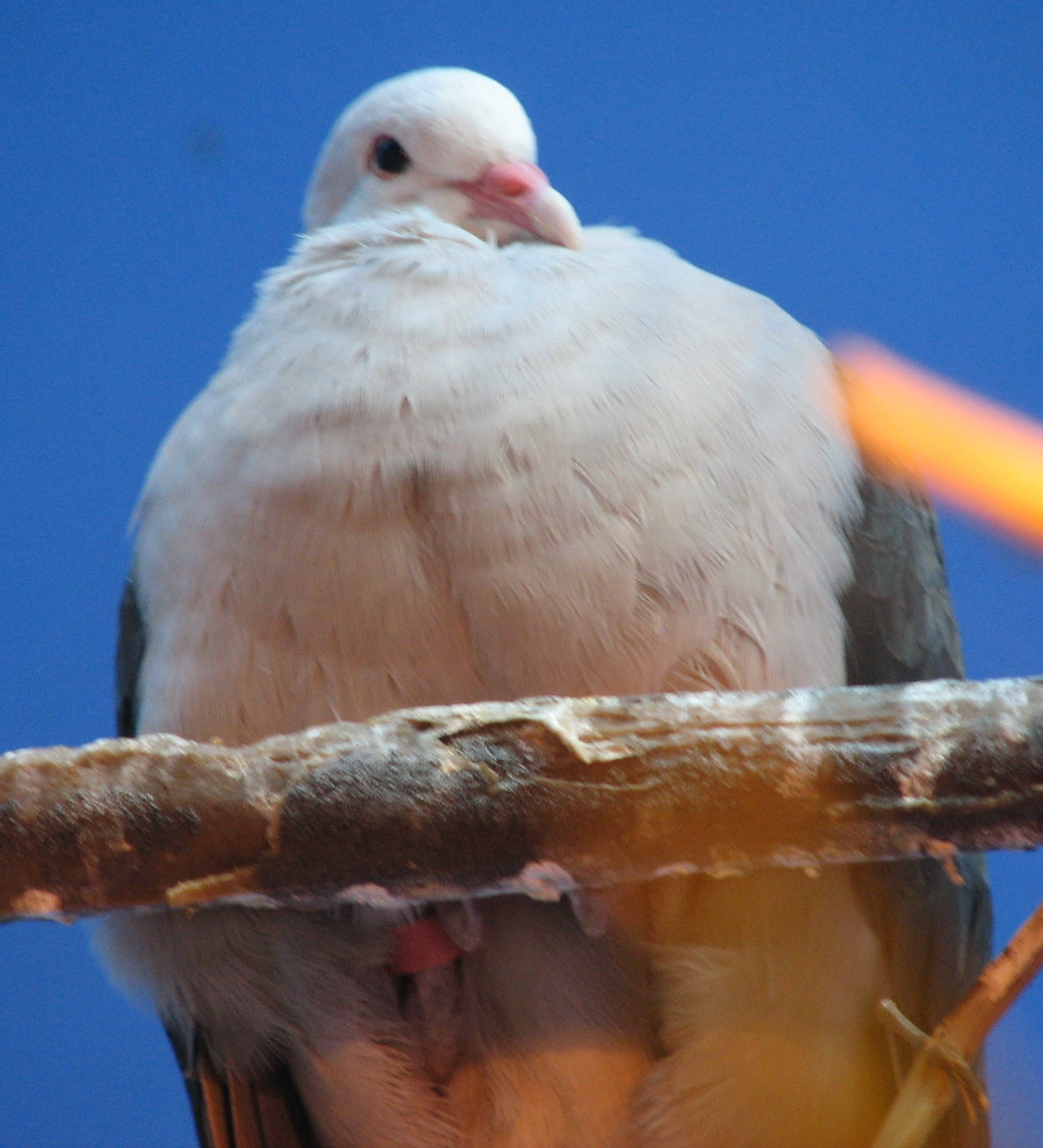 Columba mayeri - Pink Pigeon